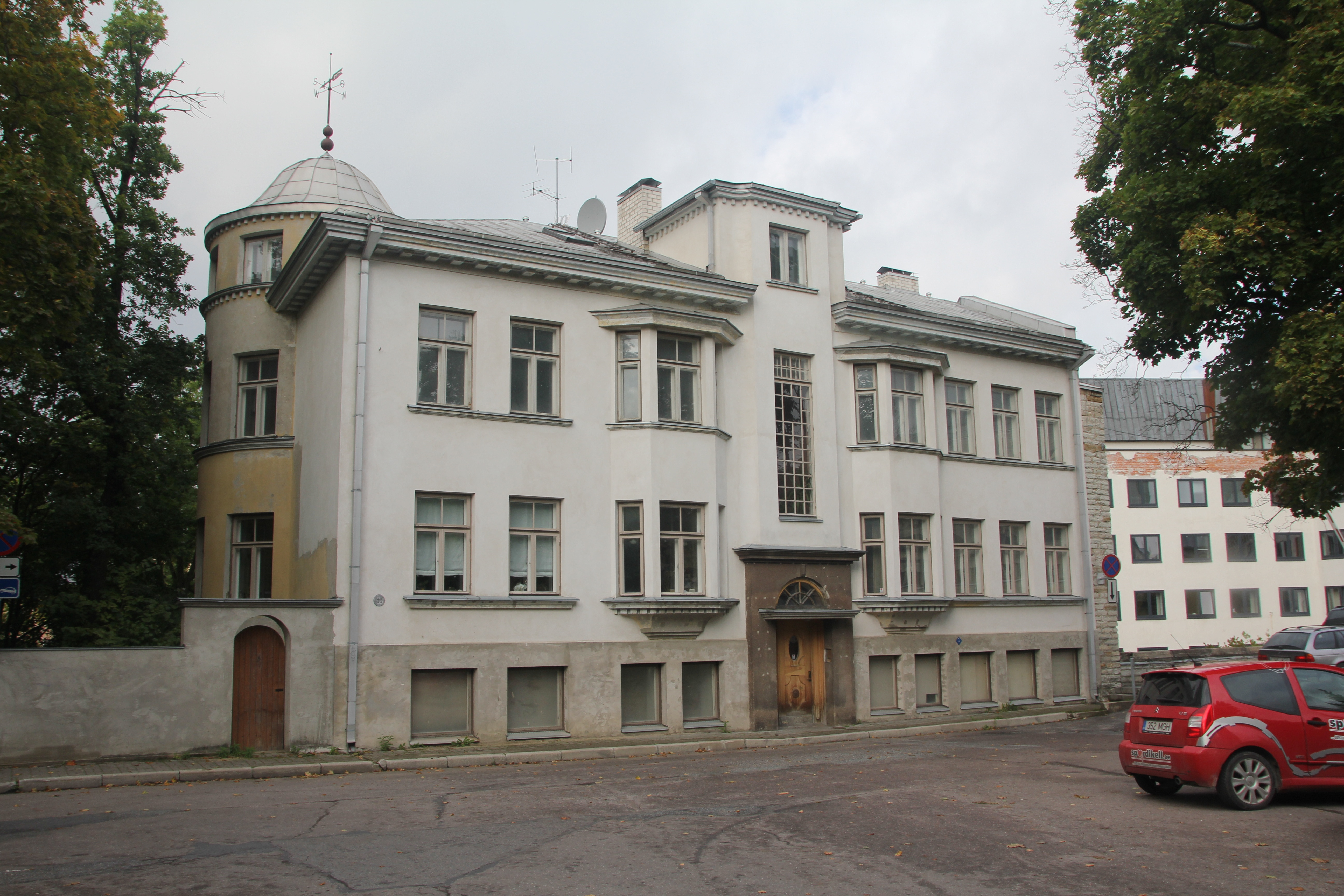 Elamu Toom-Kuninga tn 10 (Endla 9), 1930. aastad